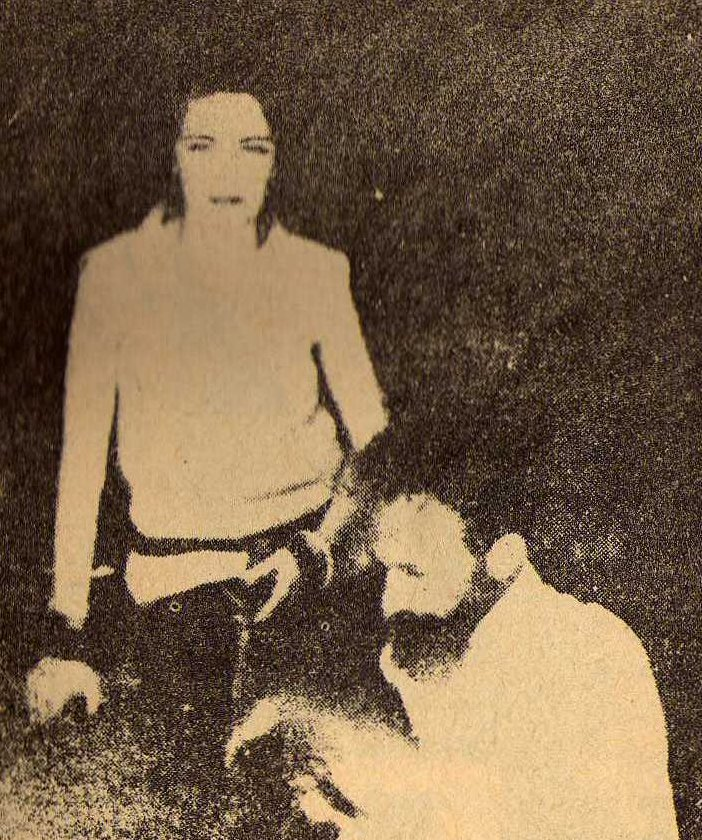 Horacio Quiroga fotogratiat en sa segona dona, María Elena Bravo, el 1927.